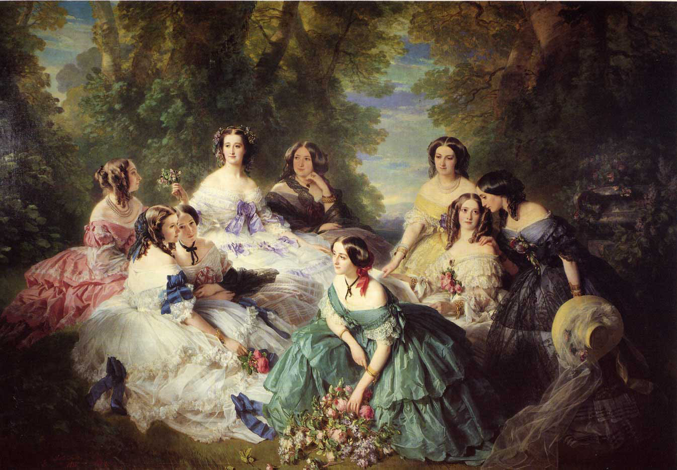 Portrait collectif avec l'impératrice Eugénie de Montijo, la baronne de Pierres, la princesse d'Essling, la vicomtesse de Lezay-Marnésia, la marquise de Montebello, la duchesse de Bassano, la baronne de Malaret, la marquise de Las Marismas et la marquise de Latour-Maubourg